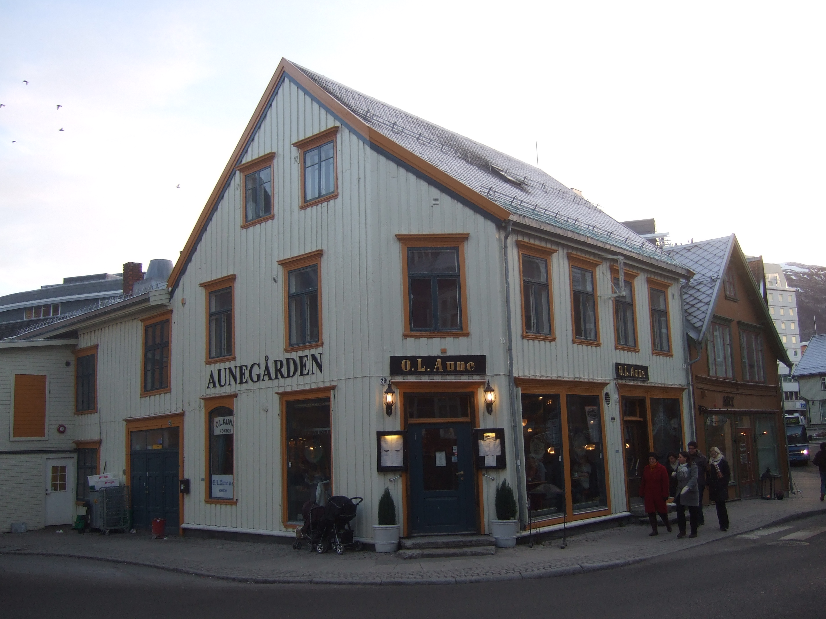 Aunegården, Tromsø